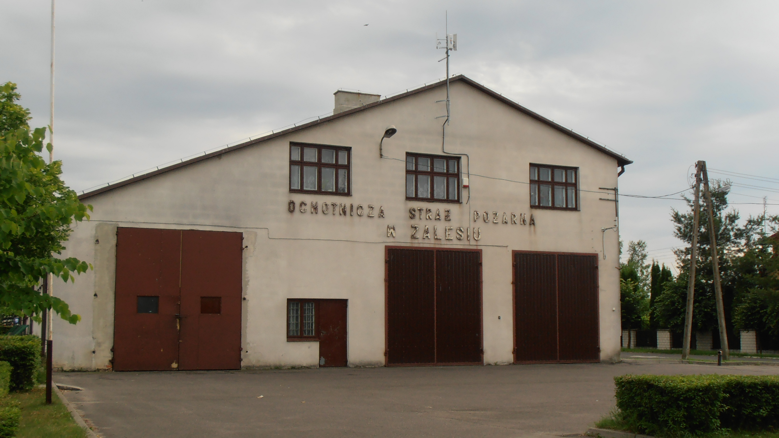 Zalesie (powiat bialski, woj. lubelskie, Polska). Remiza strażacka.